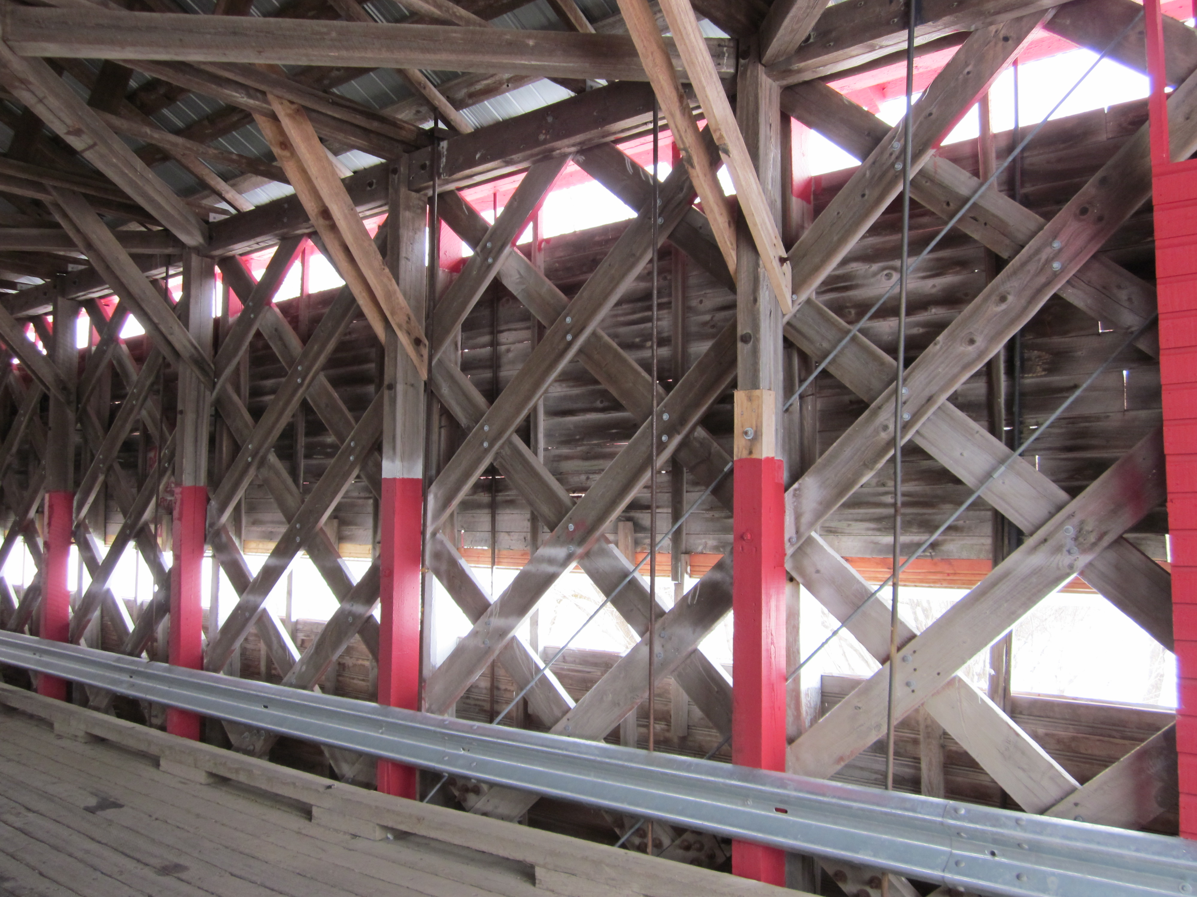 Vue du treillis « Town élaboré » du pont Bordeleau à Saint-Séverin.